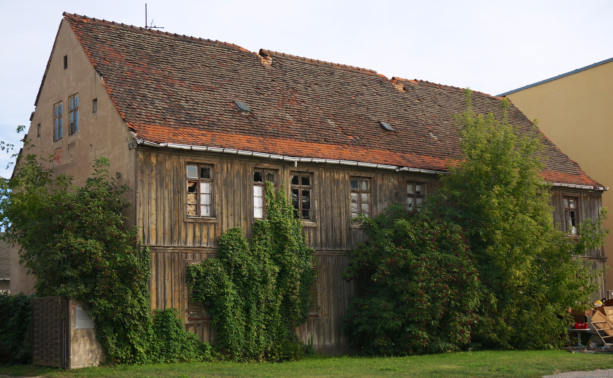 Wohnhaus Triftweg 4 (Kulturdenkmal in Magdeburg)